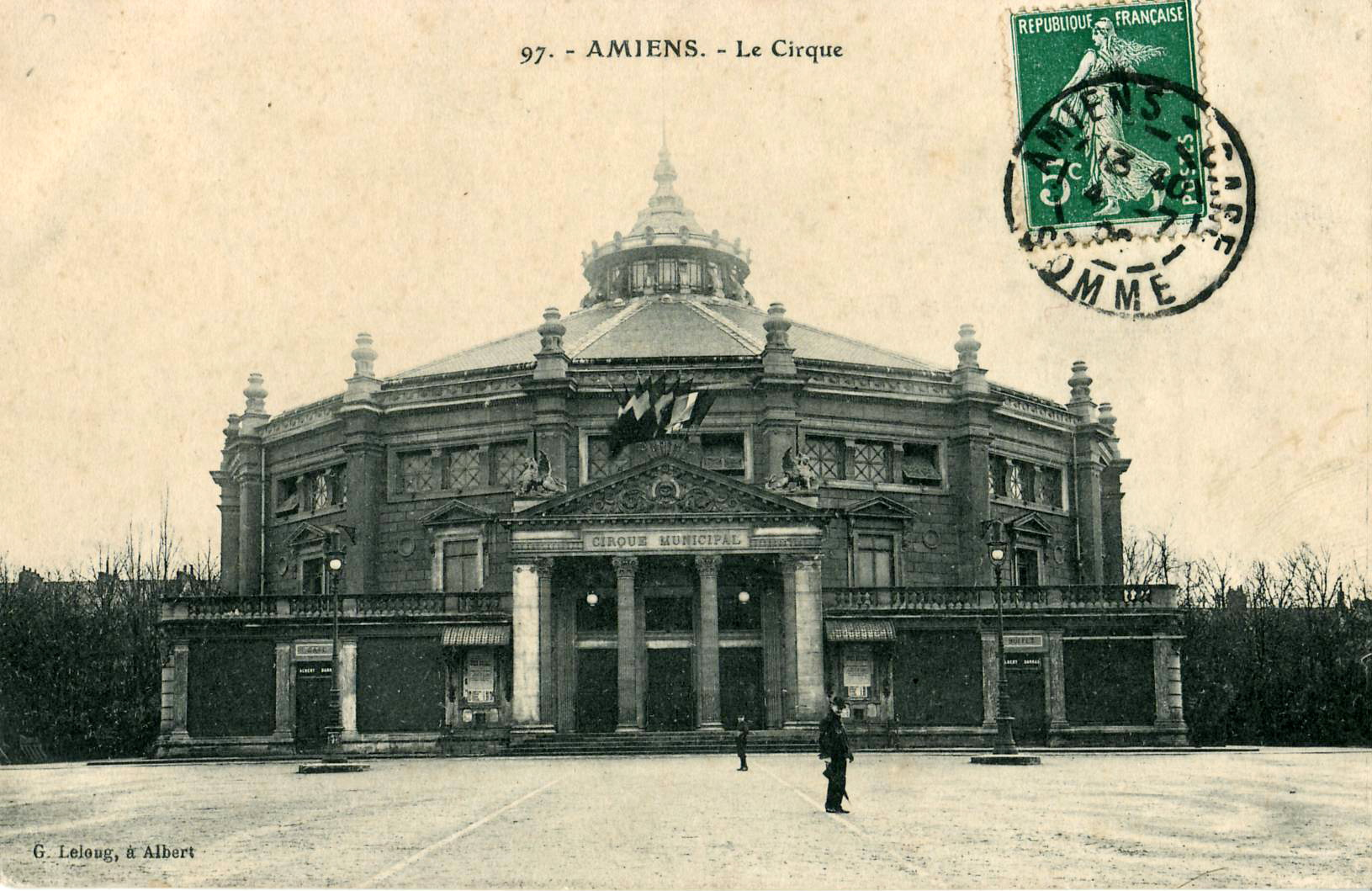 Carte postale ancienne éditée par Lelong à Amiens, n°97 :AMIENS - Le Cirque